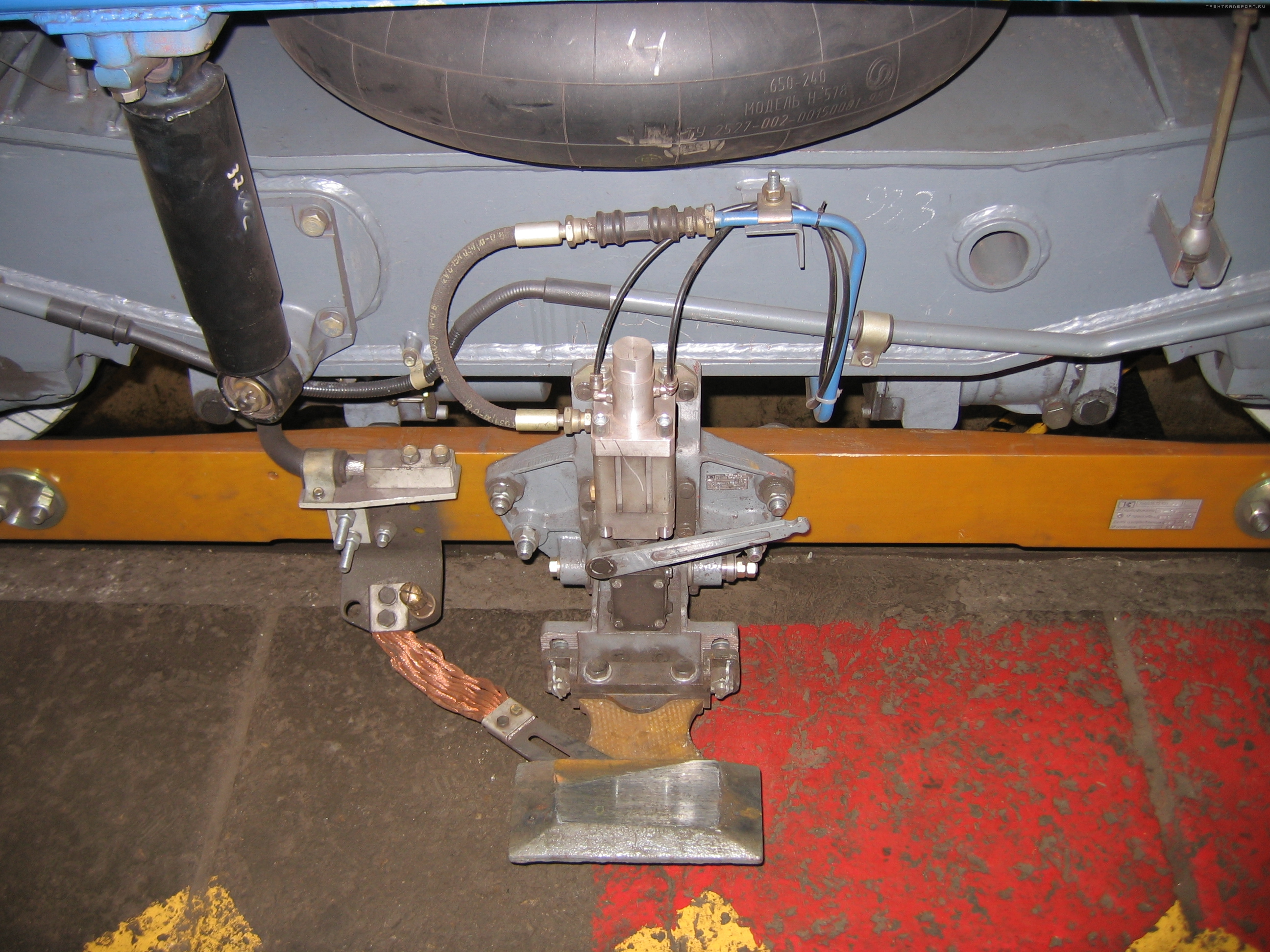 Токоприёмник на тележке электропоезда метро 81-760-761